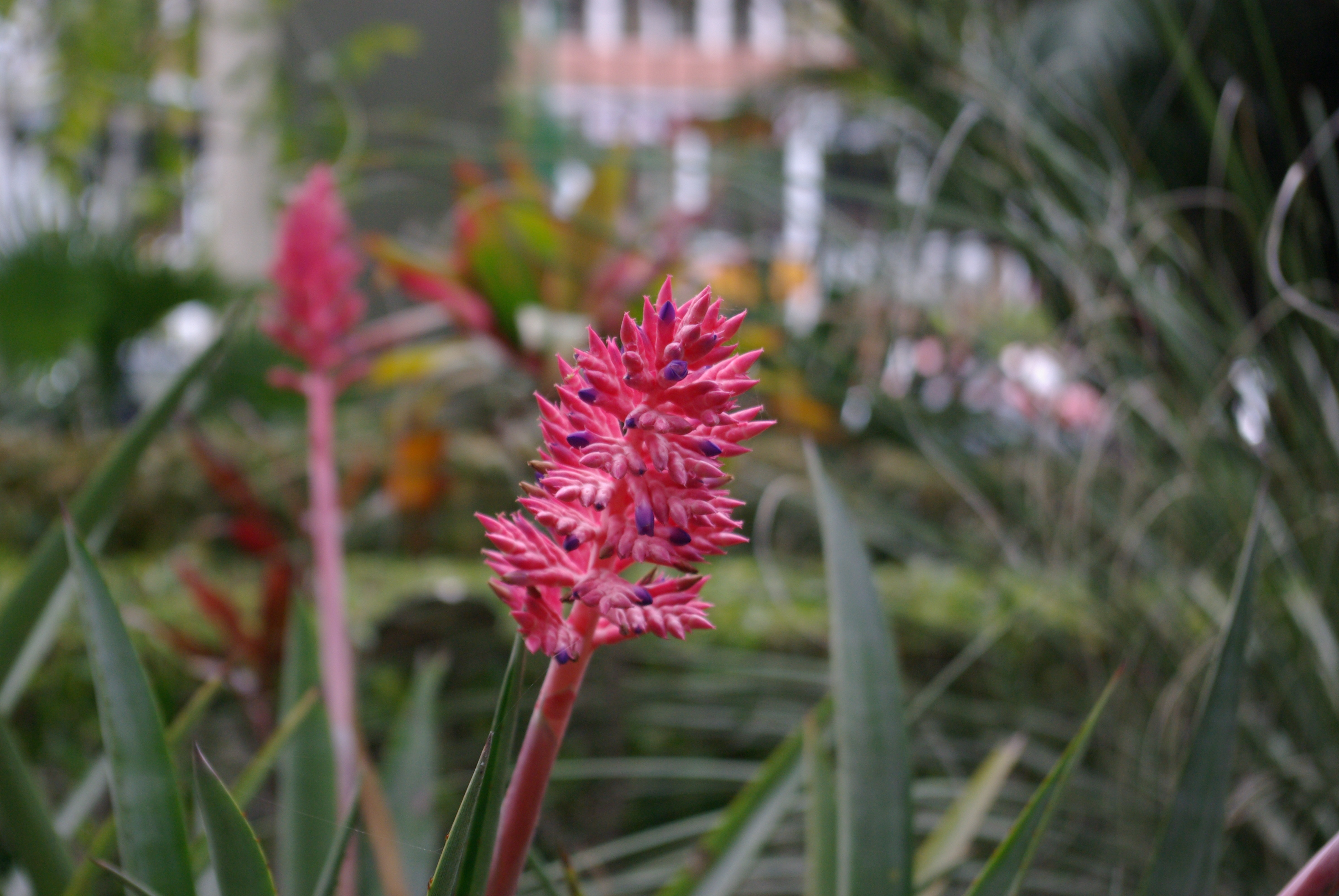 Aechmea distichantha im Botanischen Garten von Puerto de la Cruz, Teneriffa